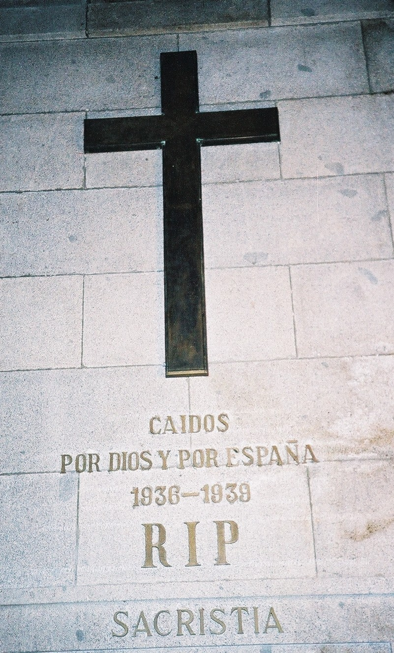 FC Georgio